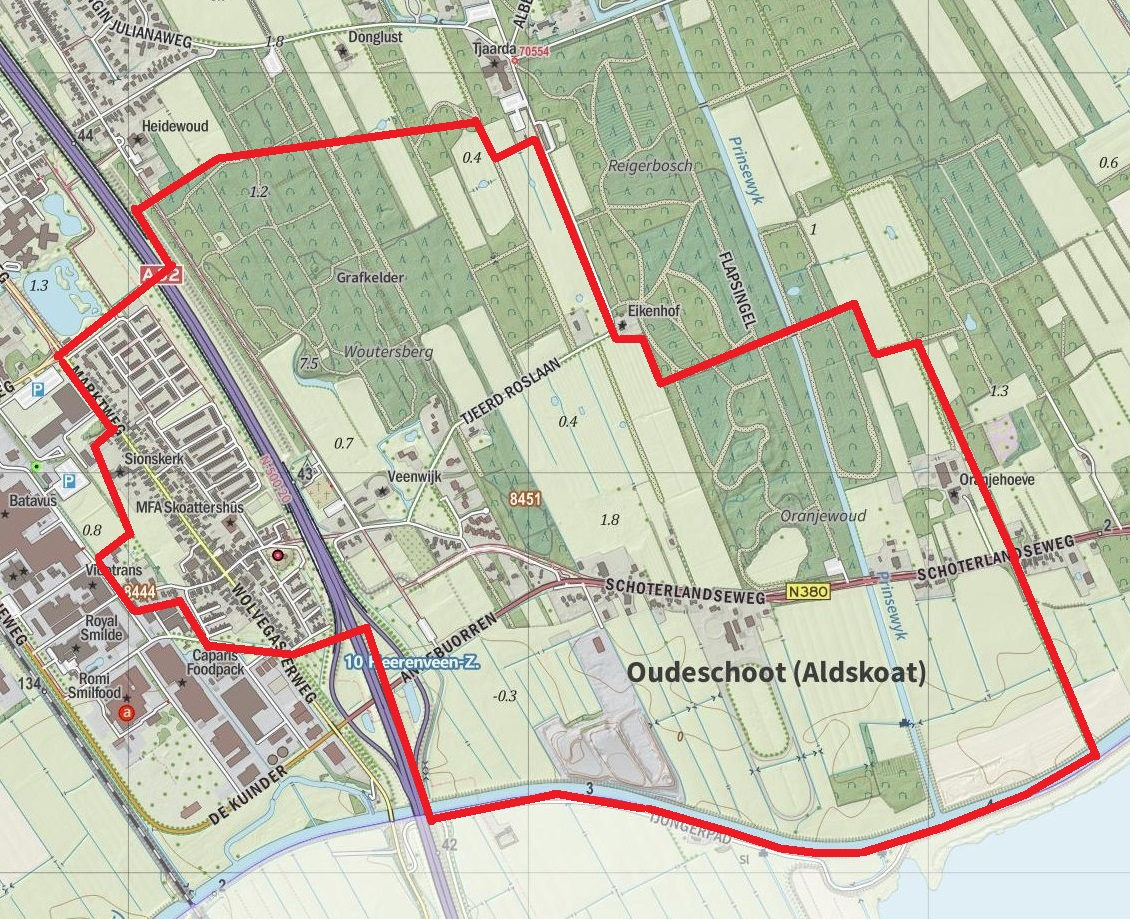 Kaart Oudeschoot